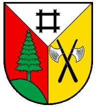 Wappen von Fenin-Vilars-Saules Kanton Neuenburg Schweiz